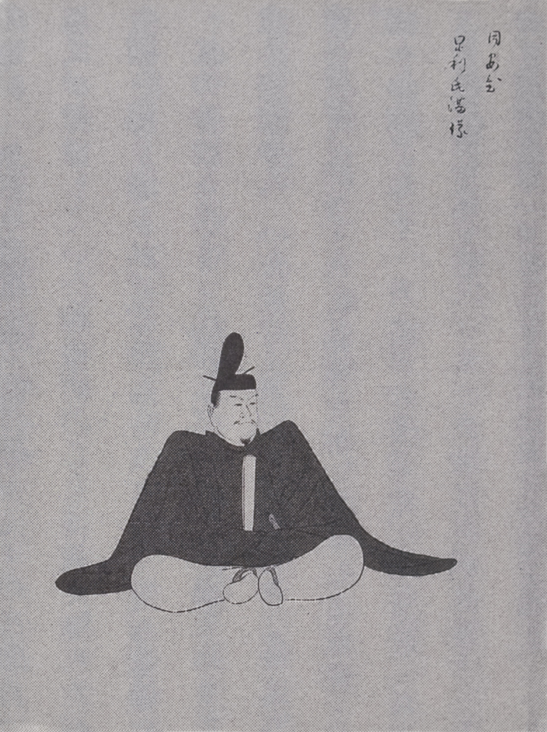 A portrait of Kantō Kubō Ashikaga Ujimitsu